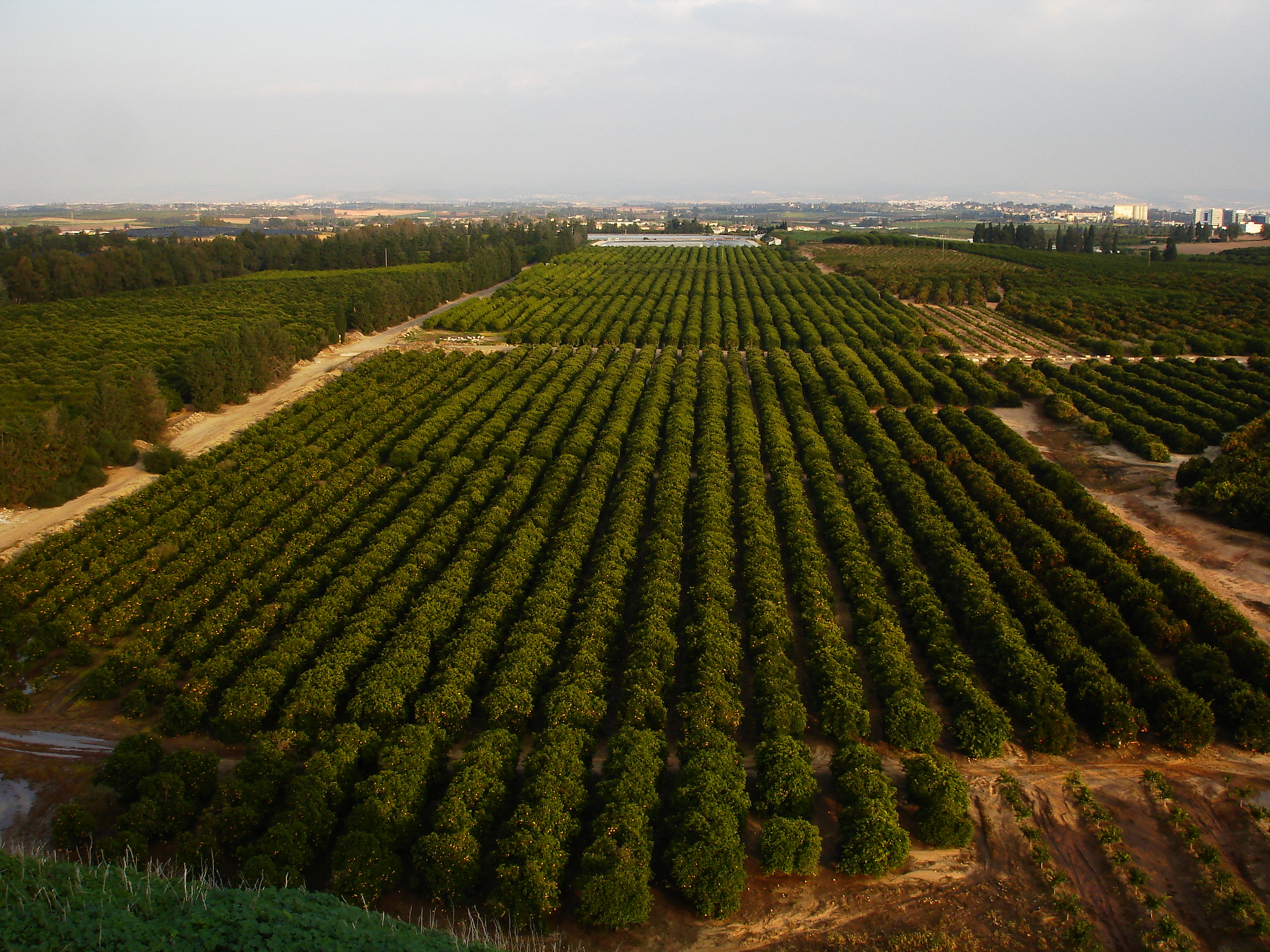 התמונה צולמה על גבי "הר הזבל", מזבלה בדימוס הממוקמת בסמוך לשכונת "כפר נחמן" שברעננה, ממנה נשקף נוף של 360 מעלות. מהר הזבל ניתן לצפות על ארובות חדרה, הים, תל אביב, רעננה, הפרדסים של בצרה, בני ציון, חרוצים ורישפון, ואף לראות ביום טוב גם את הרי השומרון.